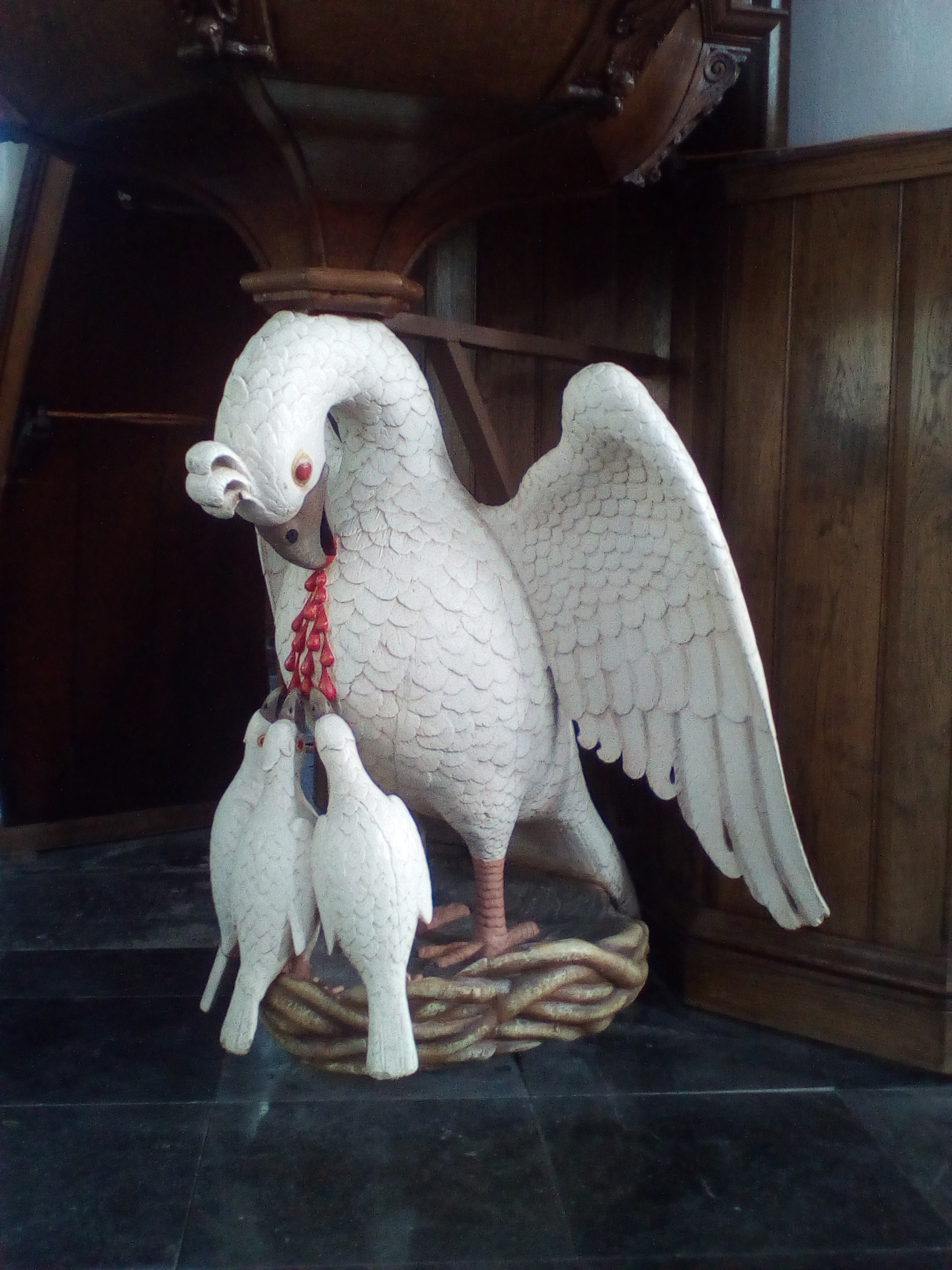 Detail van de Pelikaan onder de preekstoel van de Bullekerk in Zaandam